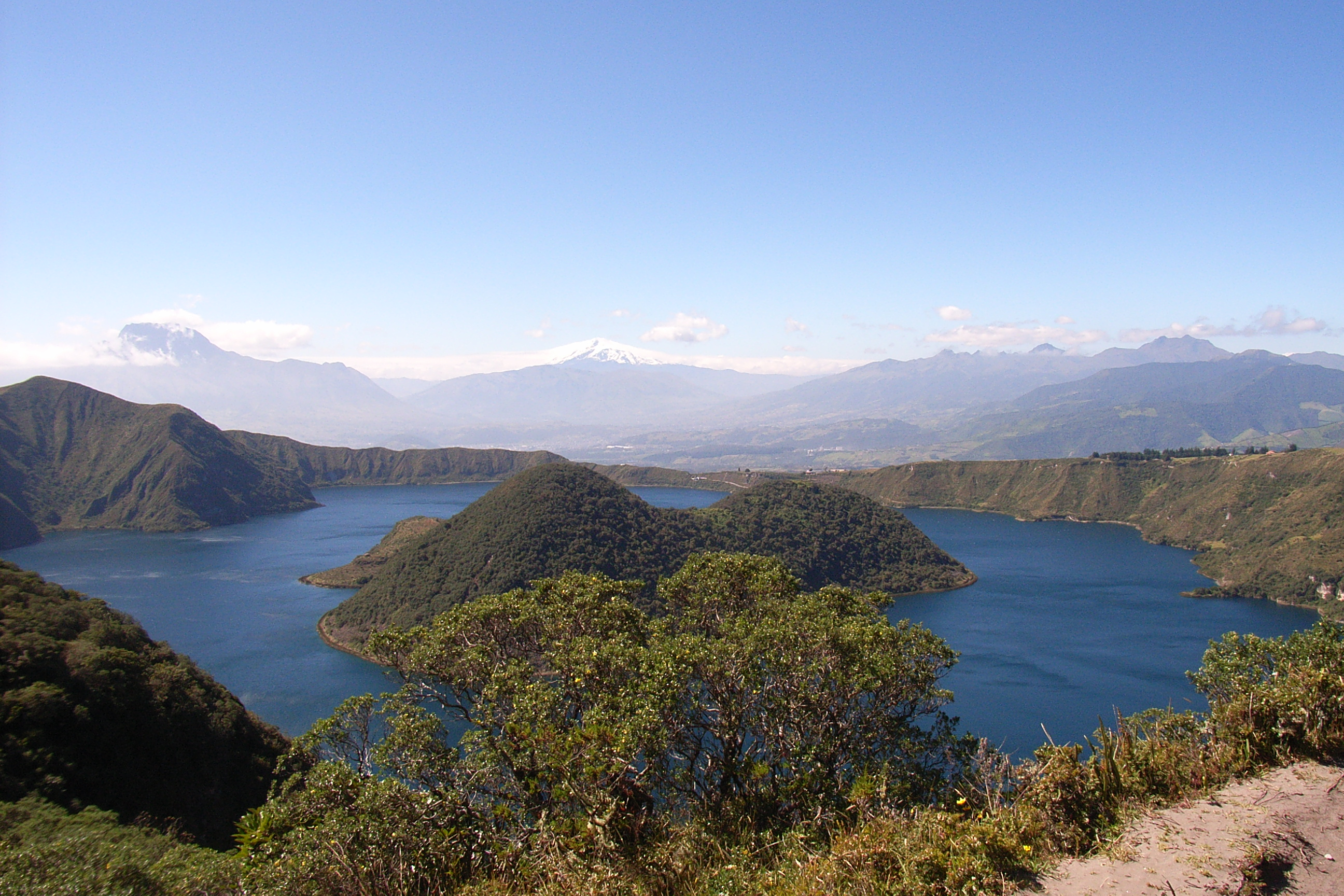 Cayambe (Hintergrund), gesehen vom Cuicocha Krater, links der Imbabura